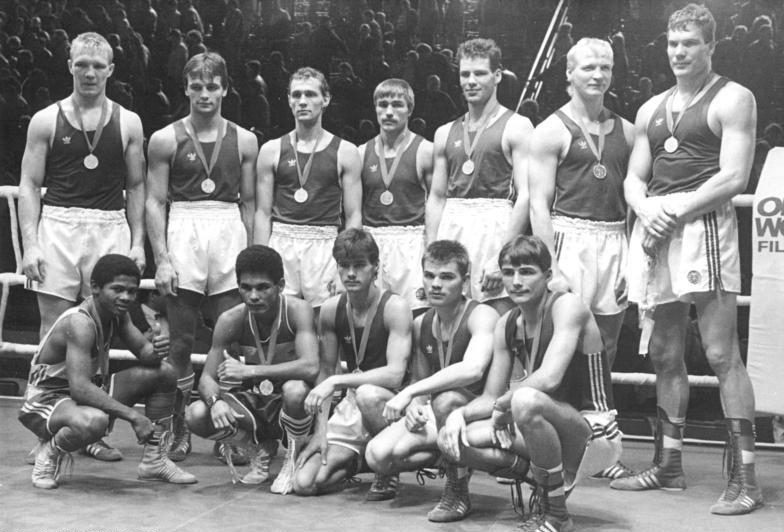 ADN-ZB Lehmann 26.3.89 Halle: XVIII. Internationales Boxturnier um den Chemie-Pokal-Die 12 Turniersieger stellen sich den Bildreportern. Vorn von links: Emilio Paisan, Jose Luis Fermin (beide Kuba), Dieter Berg, Marco Rudolph und Andreas Zülow. Stehend von links: Axel Schulz, Torsten Schmitz, Andreas Otto, Siegfried Mehnert, Henry Maske, Sven Lange und Ulli Kaden (alle DDR).